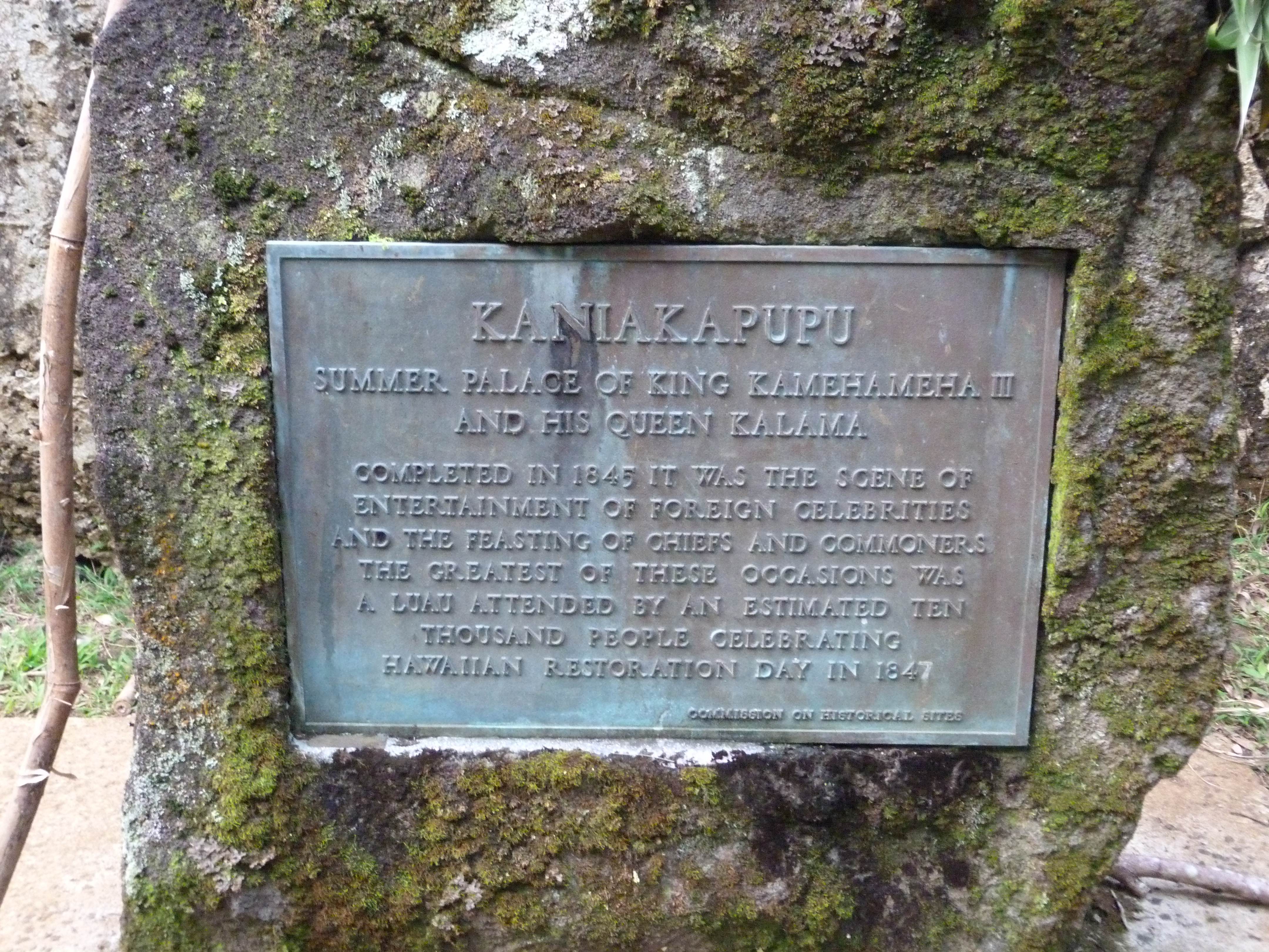 Kaniakapupu Ruins